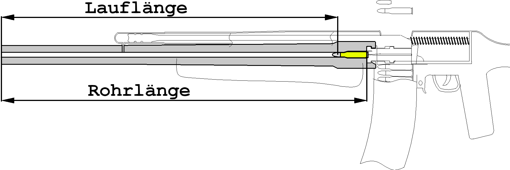 schematische Darstellung von Lauf- und Rohrlänge einer Schusswaffe; selbst erstellt Oktober 2005